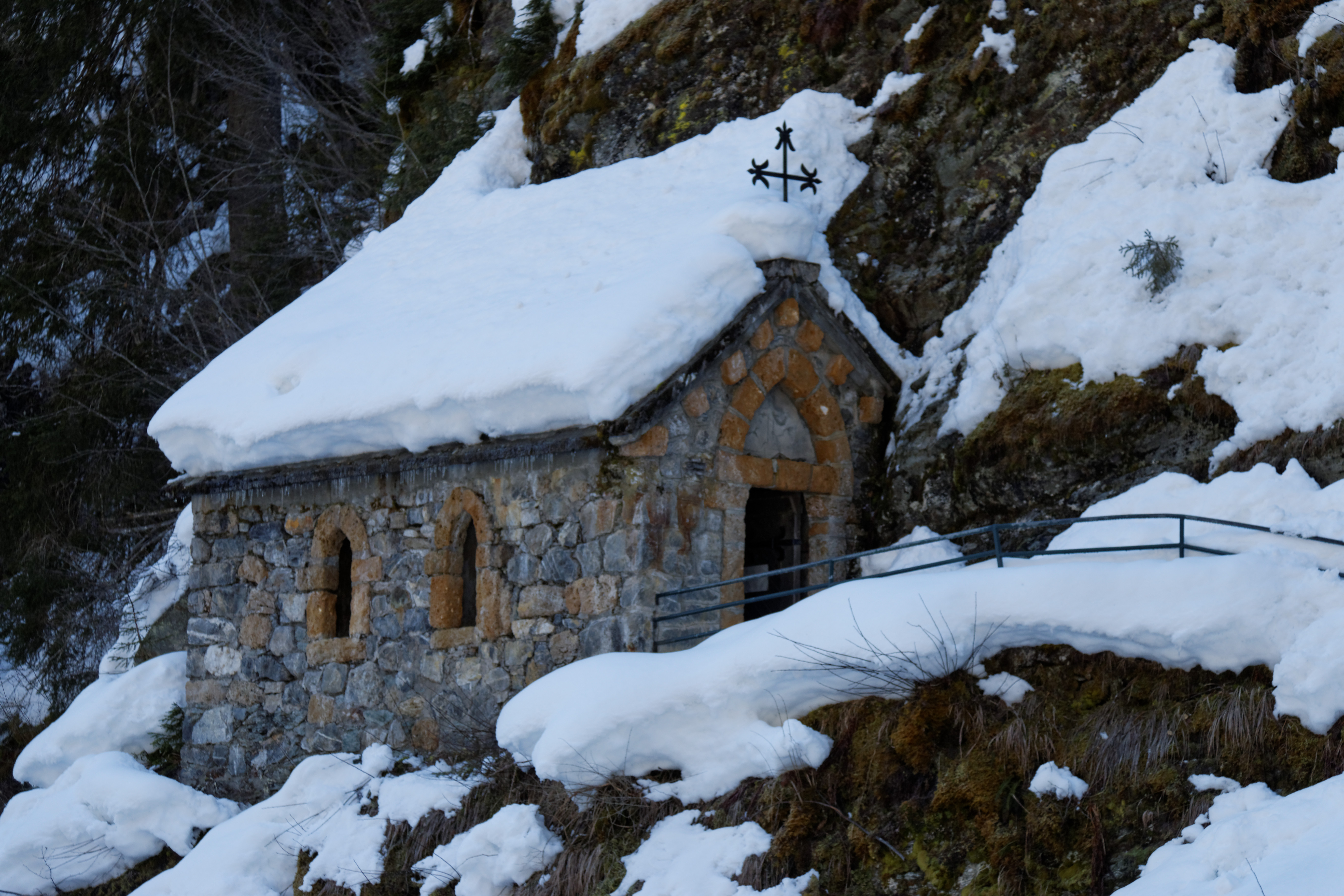 Sainte-Chapelle des Contamines-Montjoie